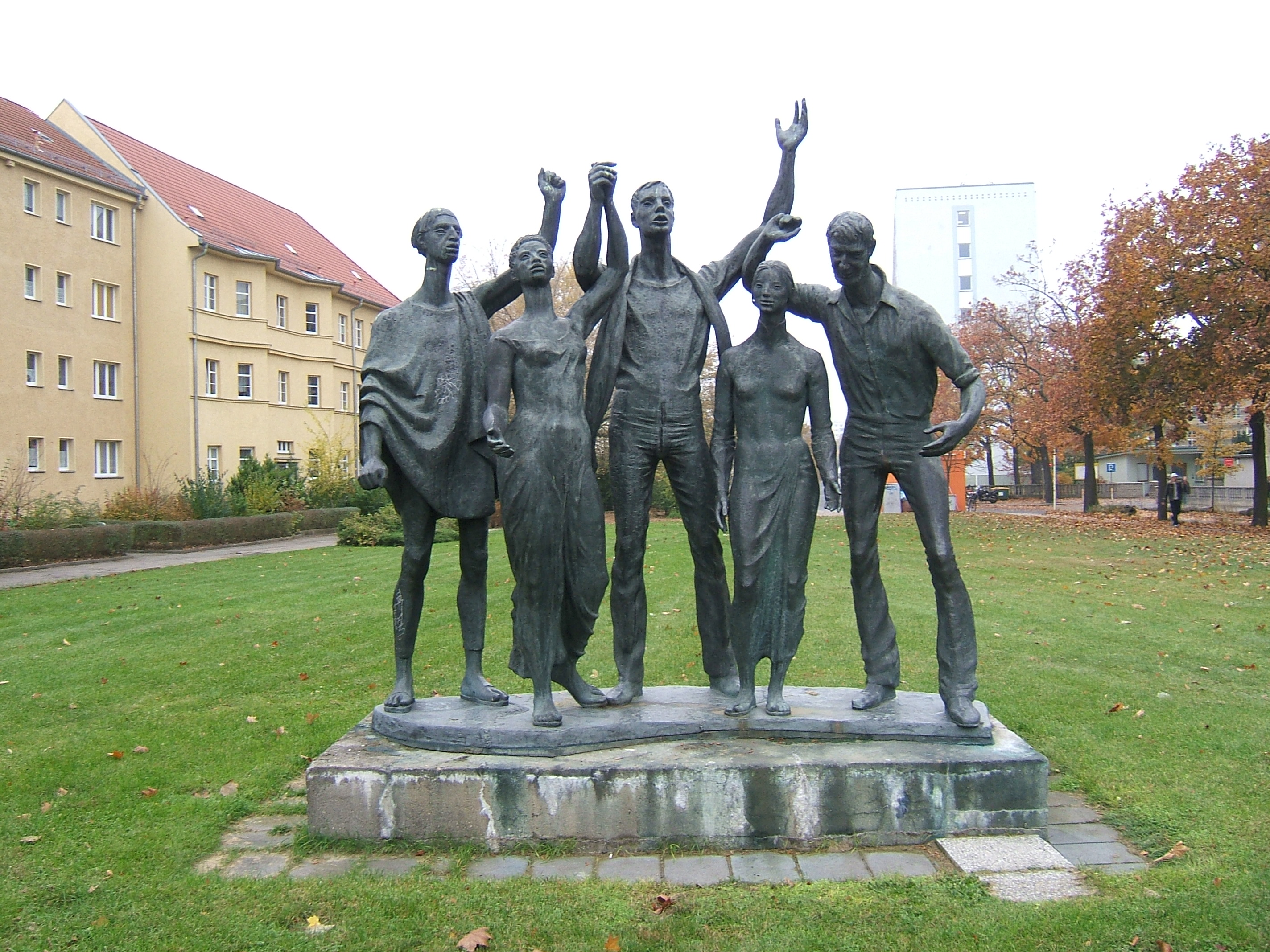 sculpture Weltjugend by Senta Baldamus in Berlin-Karlshorst/Germany